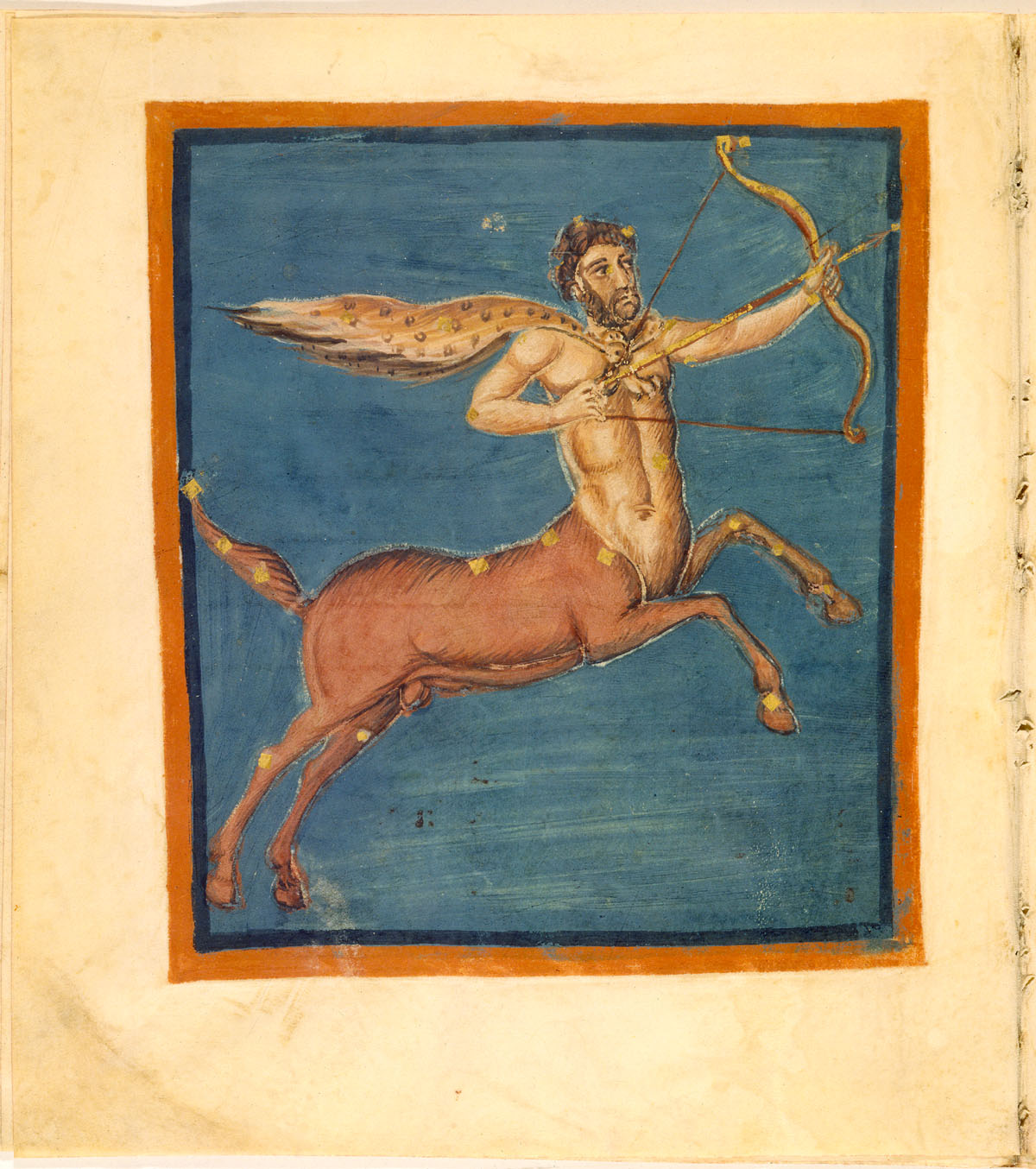 Fol. 52v Sagittarius